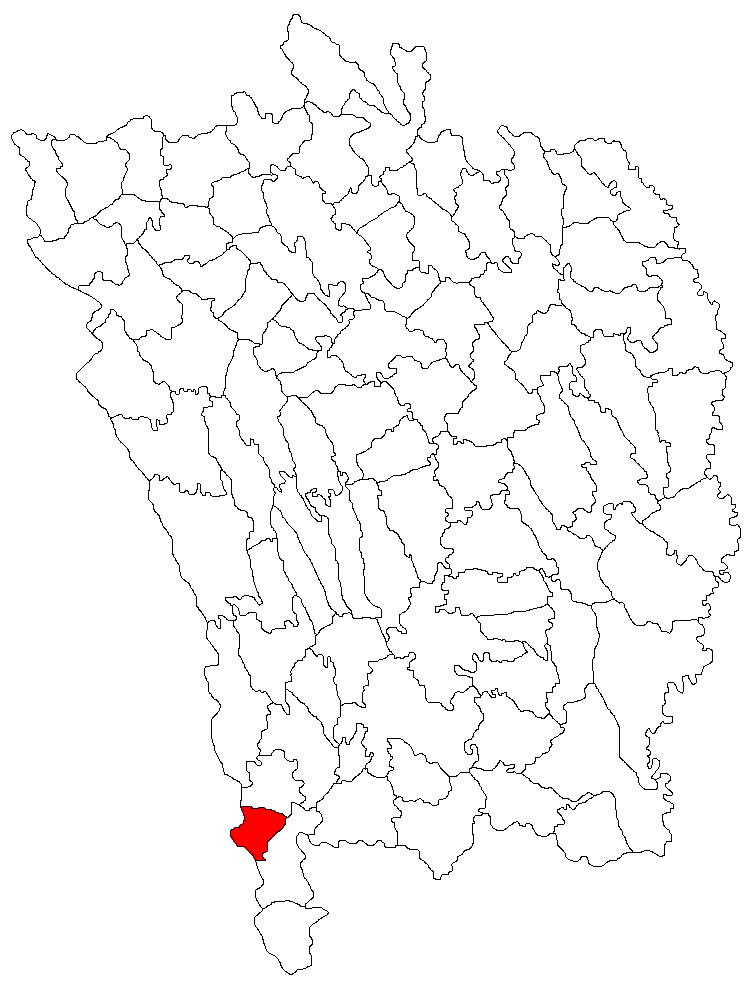 Categorie:Hărţi ale judeţului Vaslui